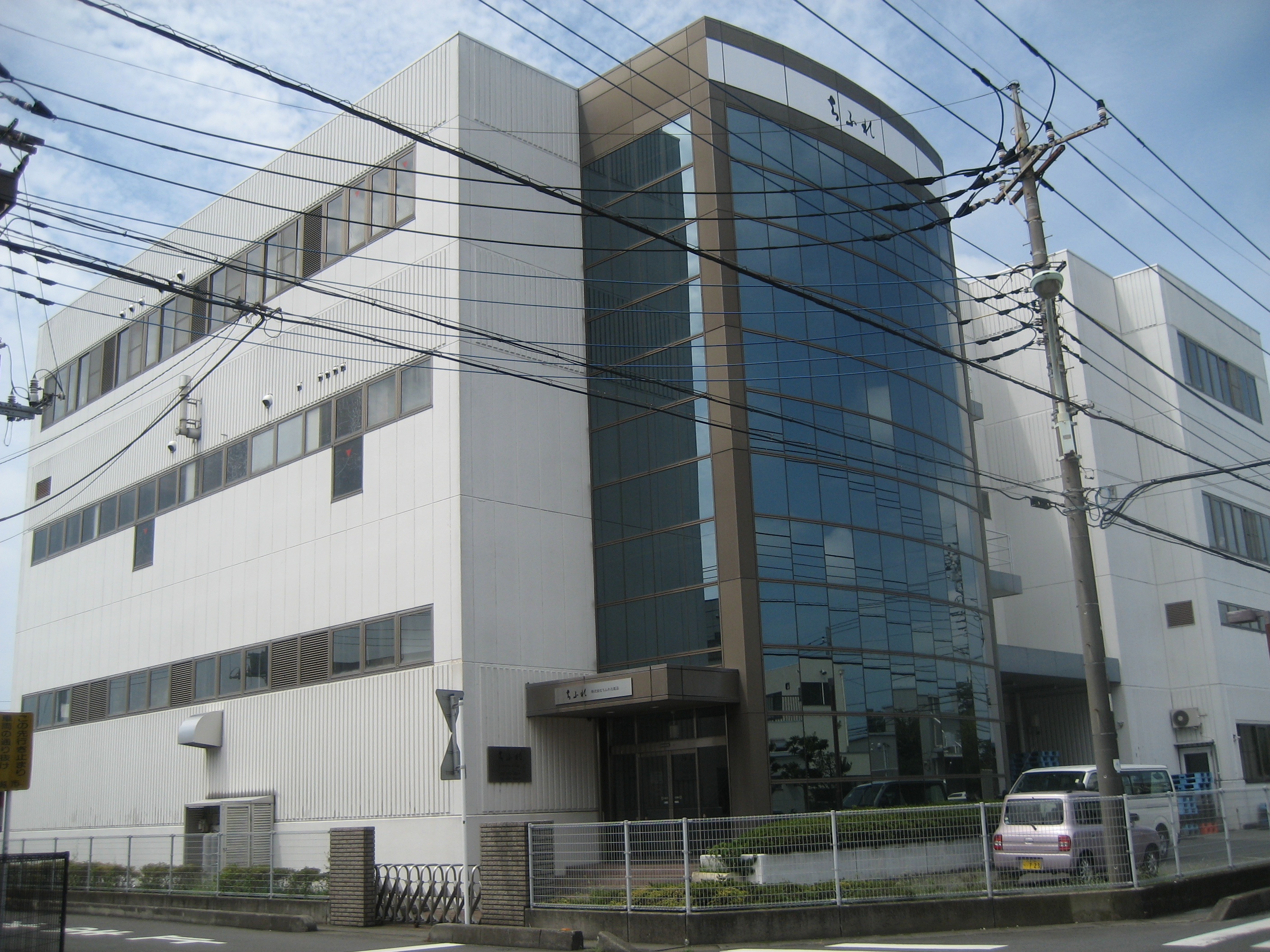 埼玉県川越市にある 株式会社ちふれ化粧品本社建物